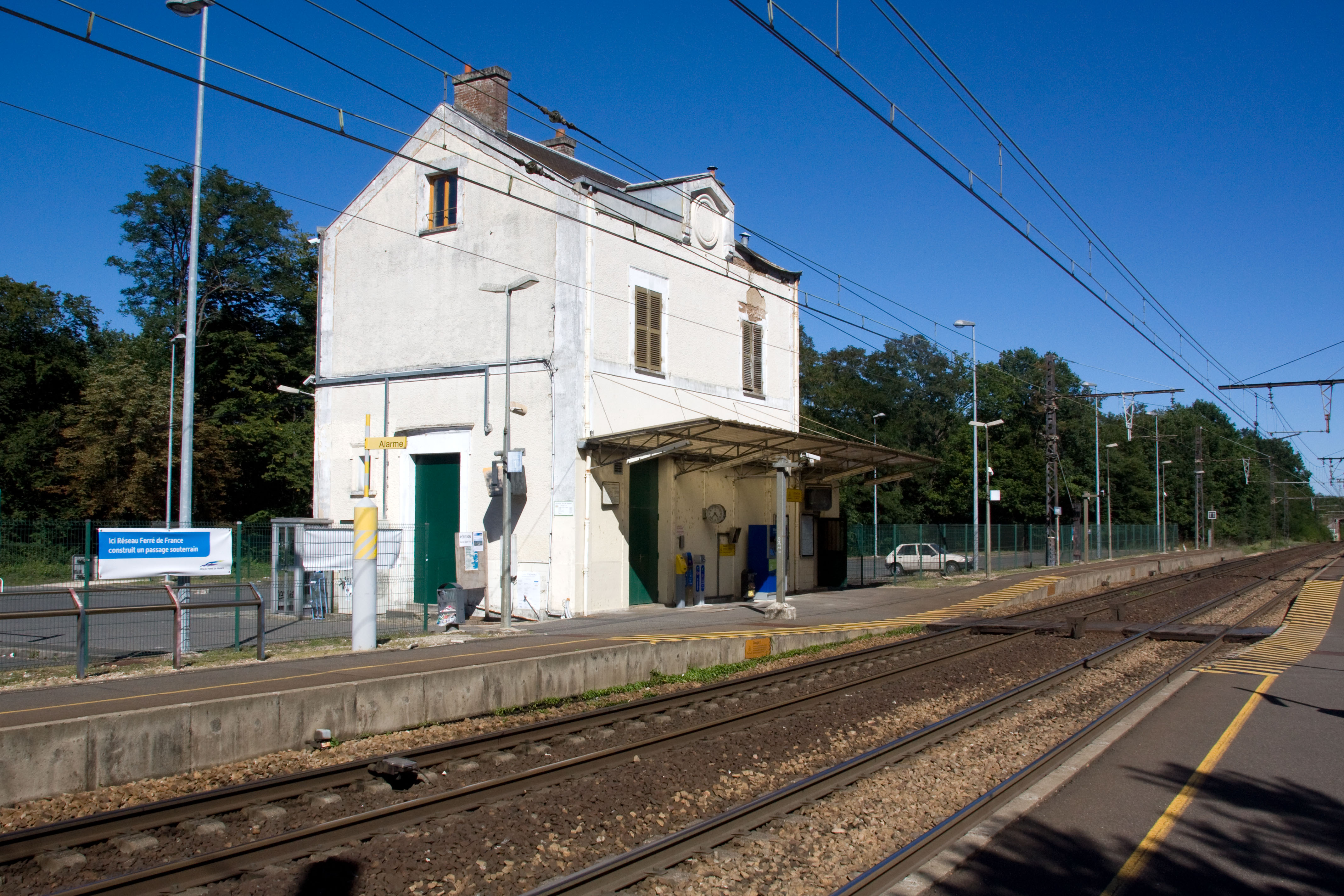 Gare de Thomery, Fontainebleau, Seine-et-Marne, France